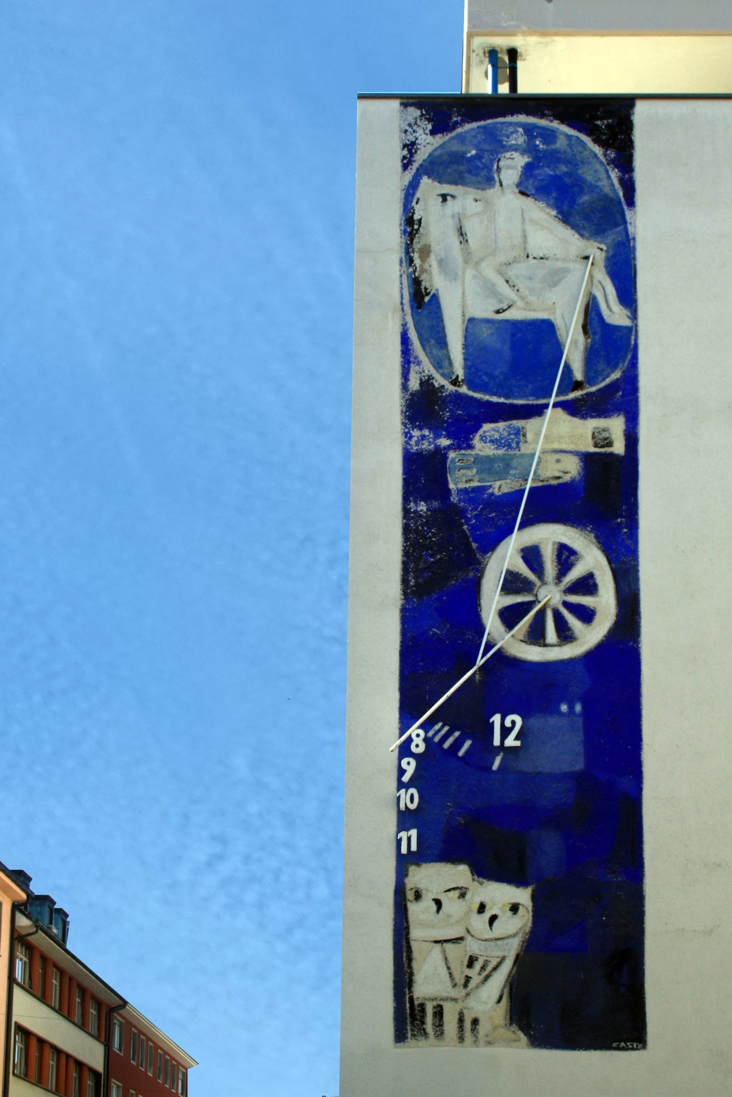 Fassadenmalerei, Leonhardsstrasse, Basel, von Gian Casty (1914-1978)